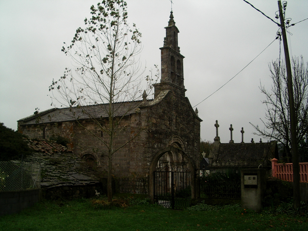 Iglesia romanica de San Vitorio de Ribas de Mino en O Savinao (Lugo, Espana). Picture taken by me in November 2006.